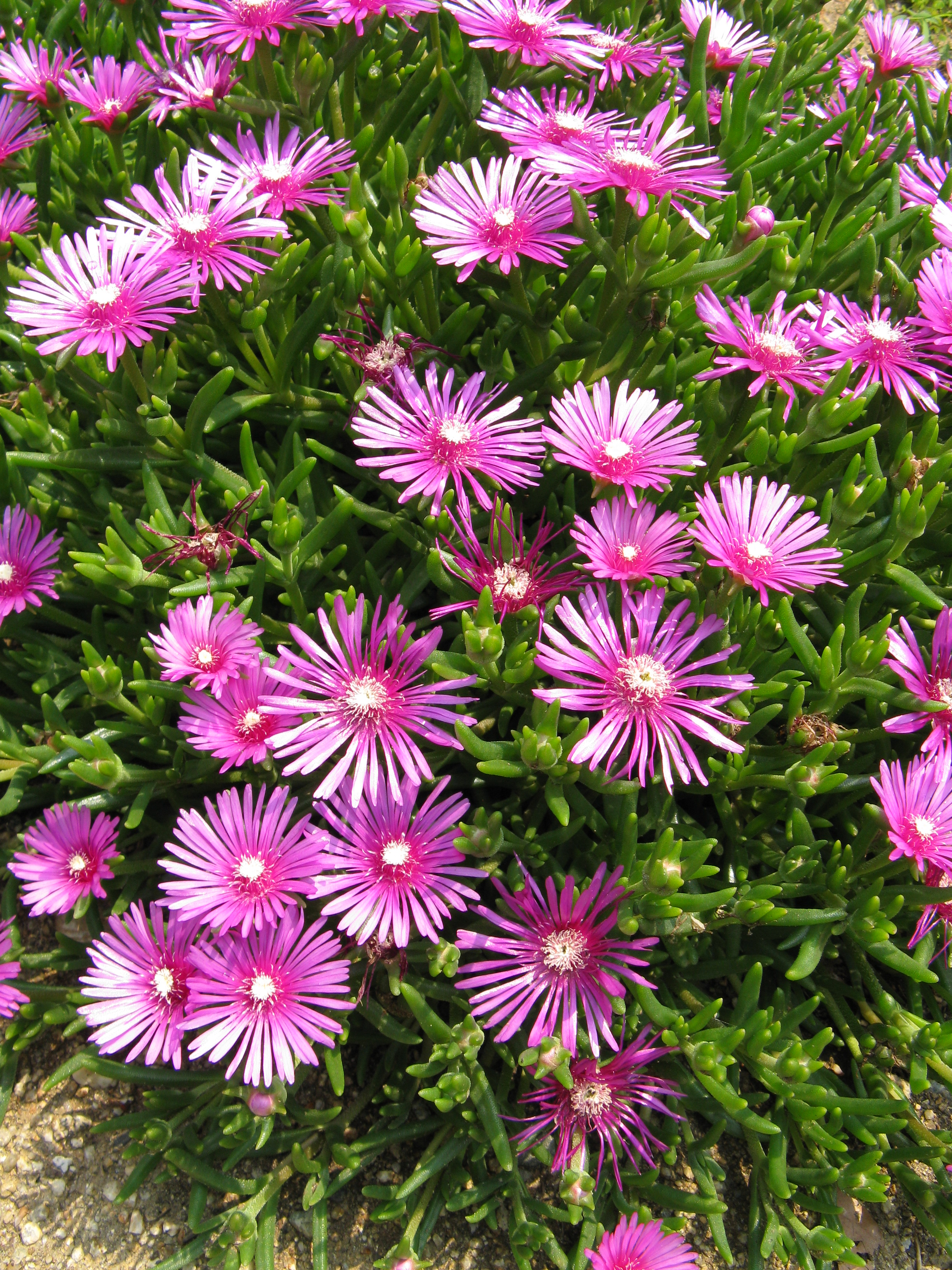 Lampranthus spectabilis